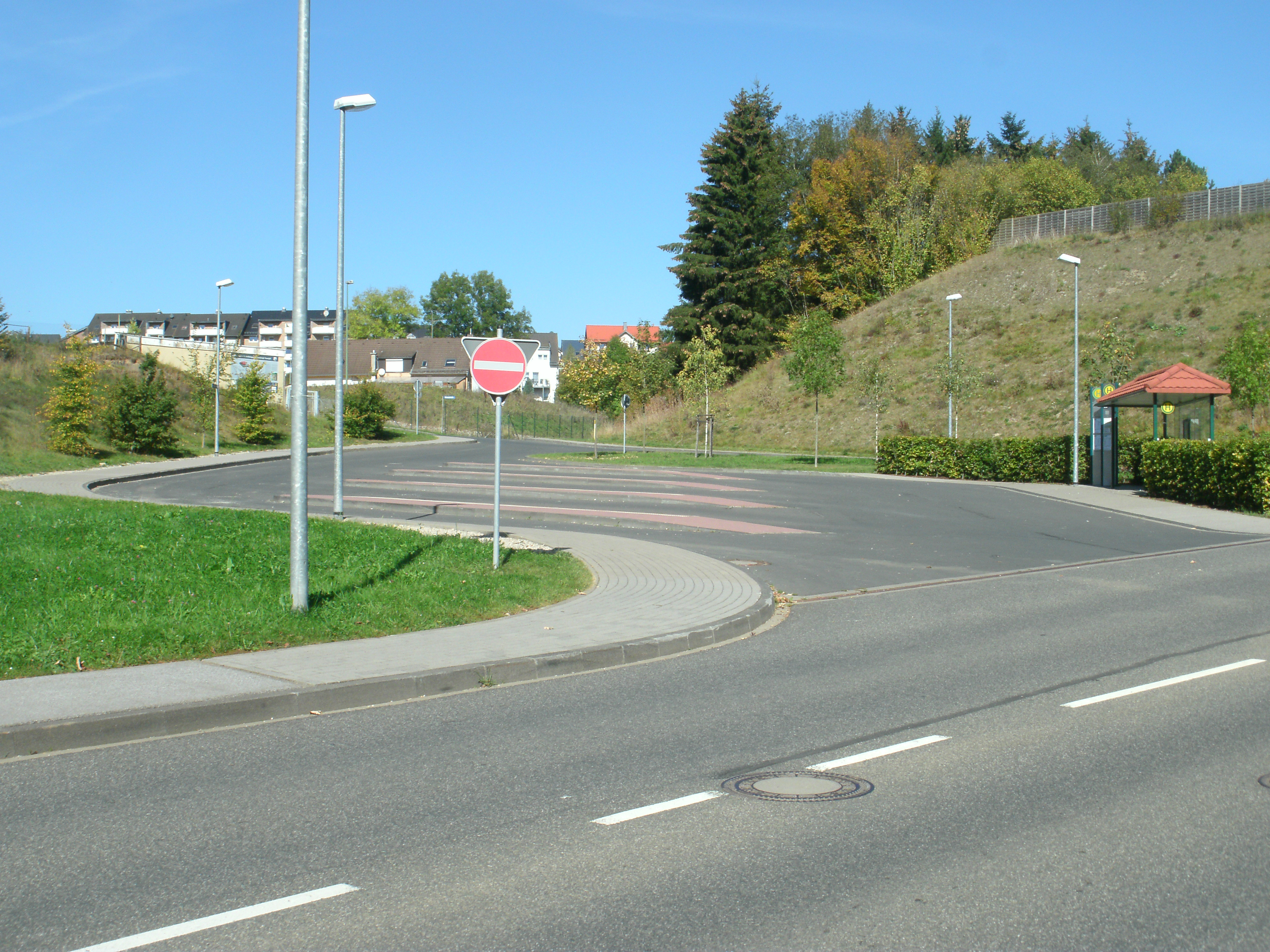 Der 2006 errichtete Busbahnhof in Blankenheim (Ahr) mit 4 Bussteigen.